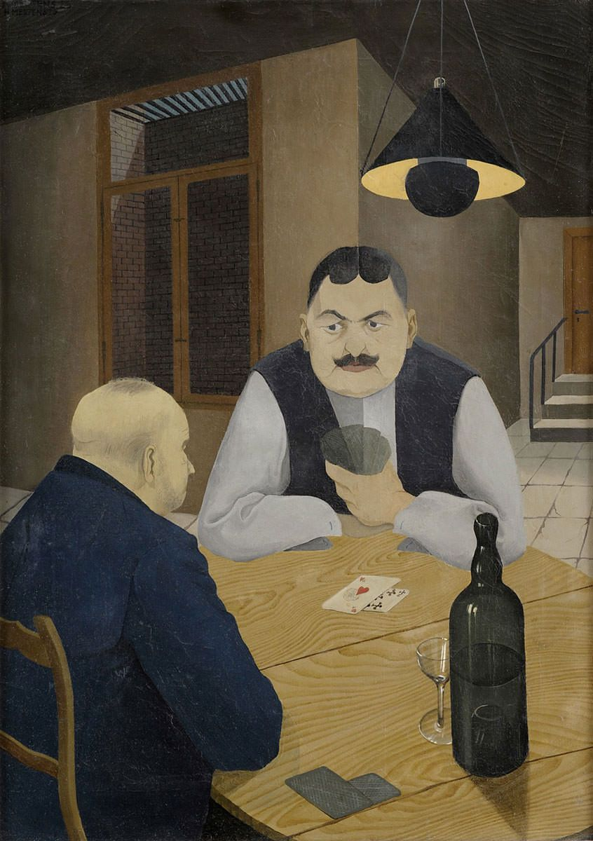 Hans Mertens: Ecartéspieler, 1926